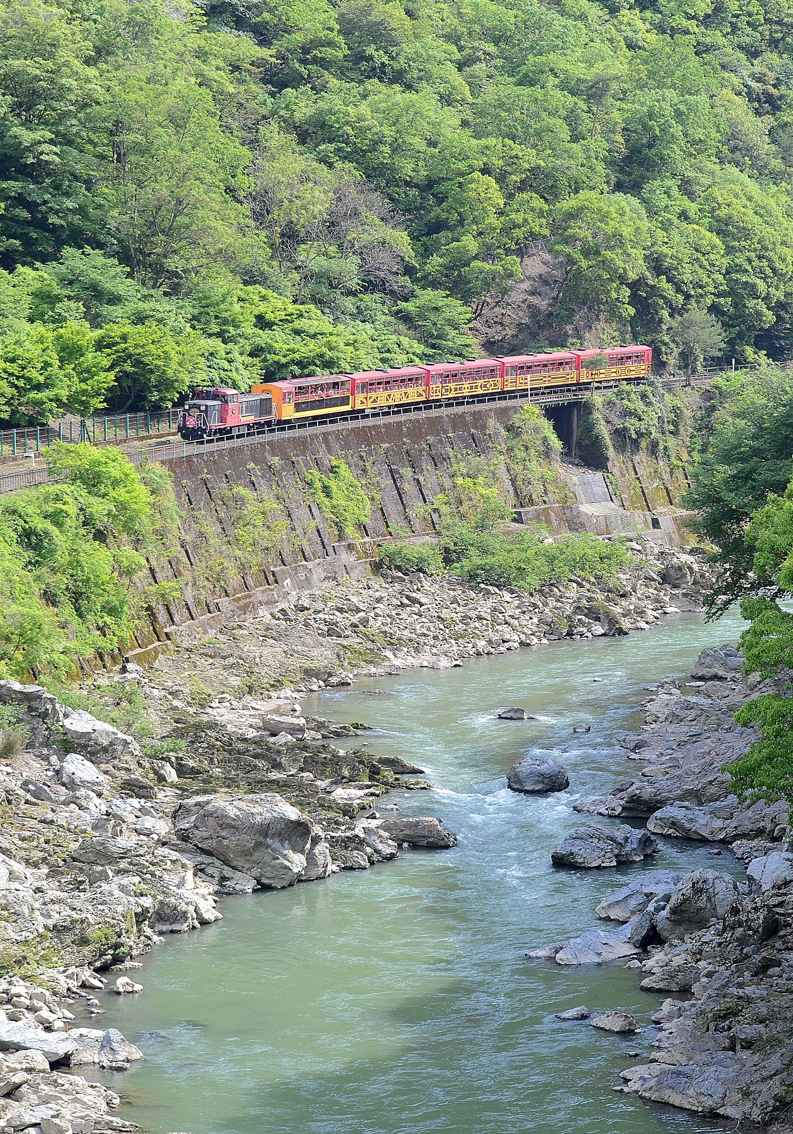 保津峡渓谷を走行する嵯峨野観光鉄道嵯峨野観光線のトロッコ列車 （保津峡駅ホームから撮影）